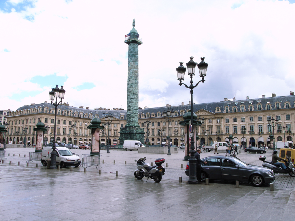 Place Vendôme, Paris